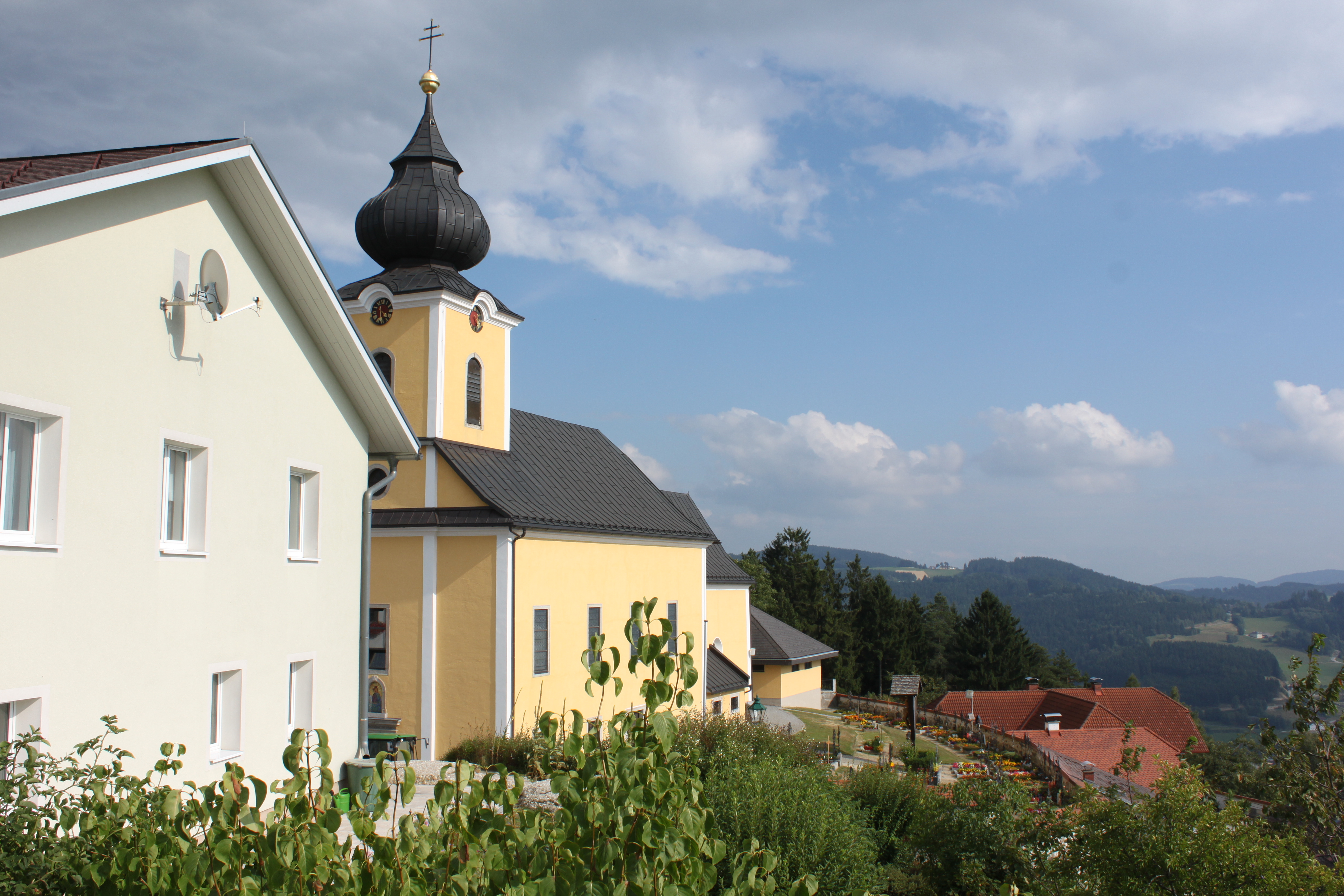 links Pfarrhof, mittig Wallfahrtskirche Mariä Heimsuchung, halbrechts Friedhof